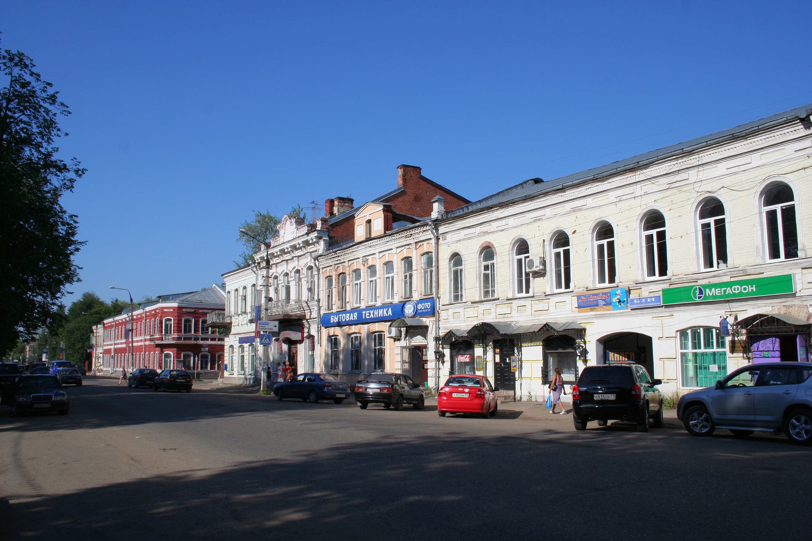 Ansichten der Stadt Wyschni Wolotschok (Oblast Twer, Russland). Stadtzentrum, Kasaner Prospekt.